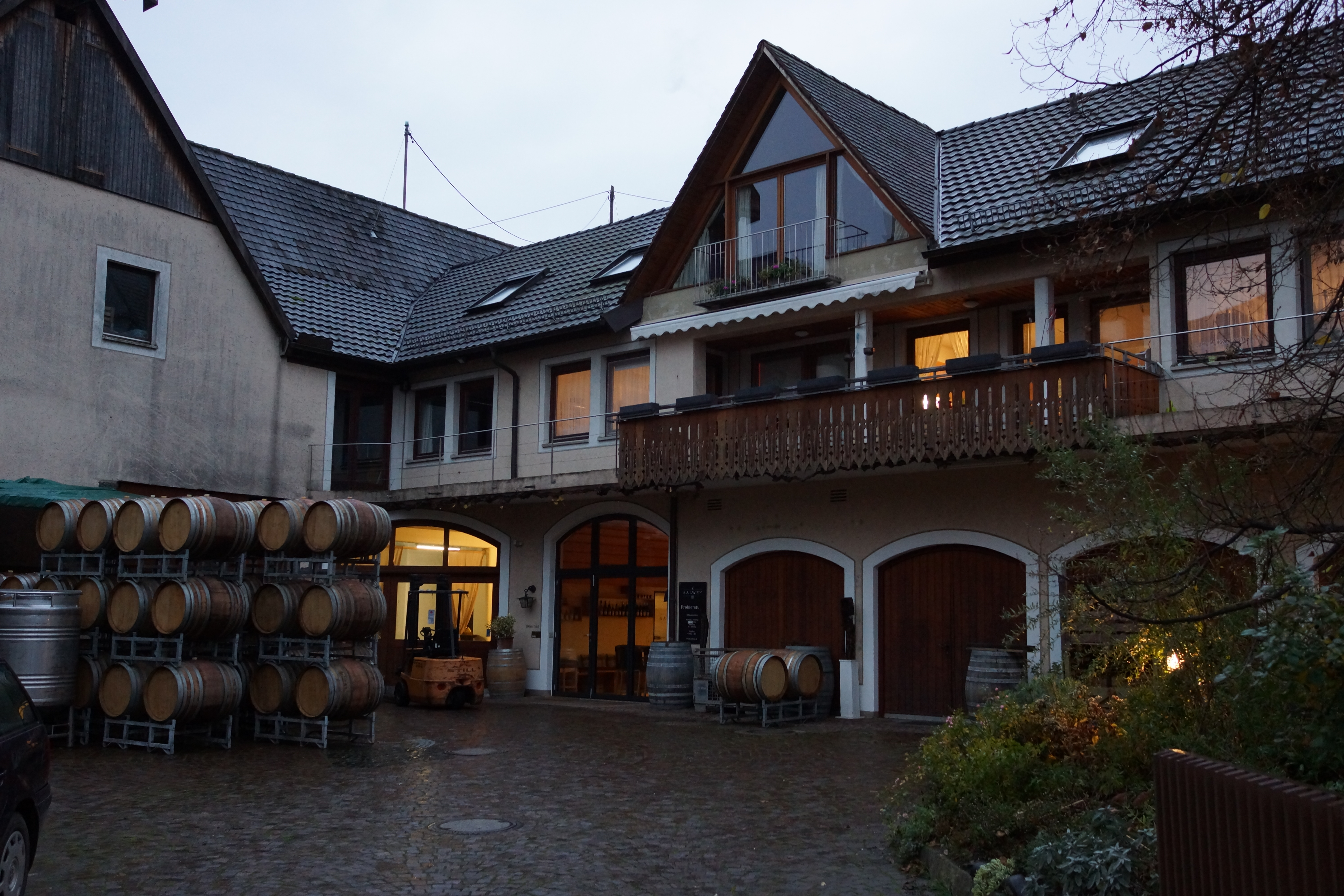 Hof und Probierstube im Weingut Salwey